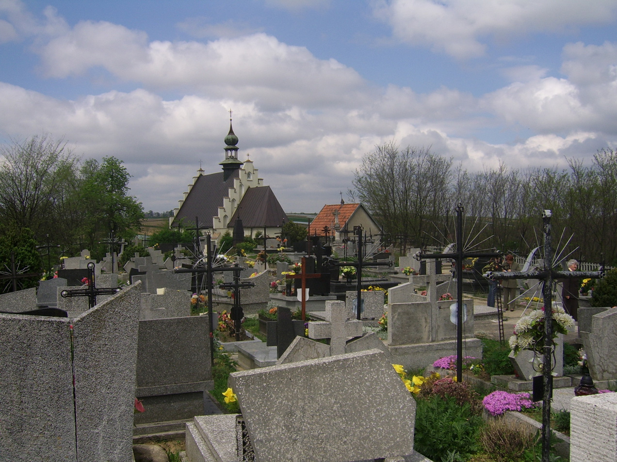 Dobranowice (powiat krakowski) - Kościół pw. Św. Krzyża, kaplica, cmentarz.